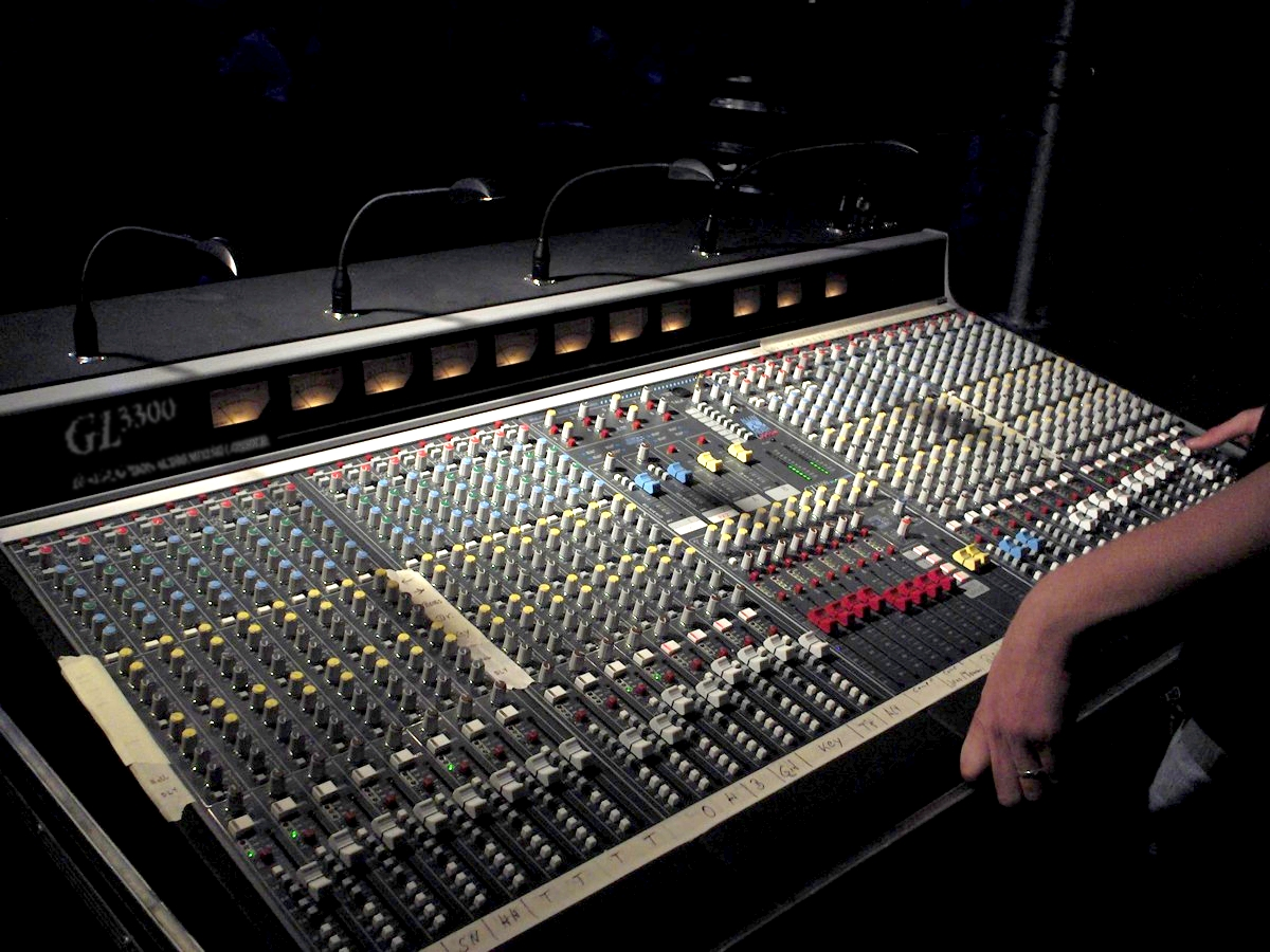 Allen & Heath GL3300 Weißenfels Schossfest 2006